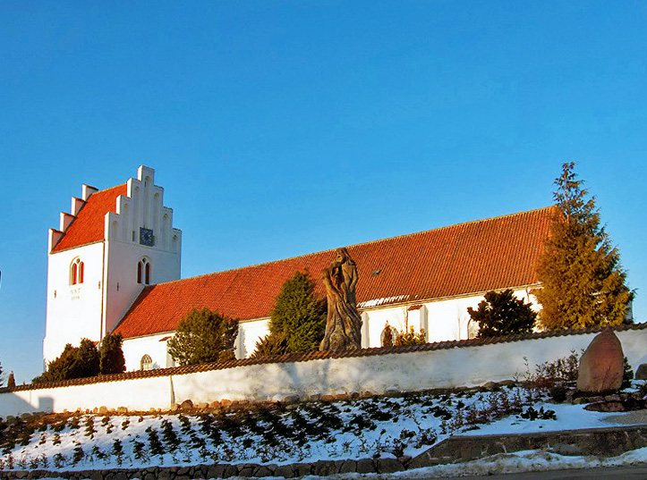 fra sydøst